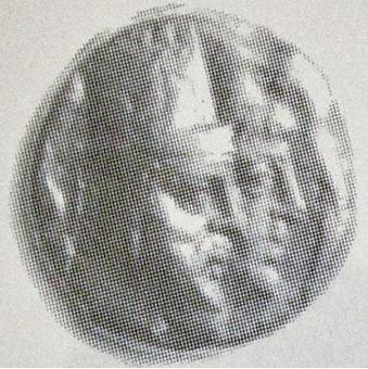 Тигран IV и Эрато. 2 г. до н.э.-1 г. н.э.